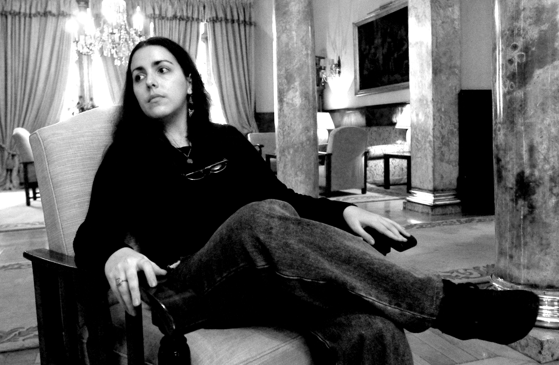 Cuban writer Ena Lucía Portela